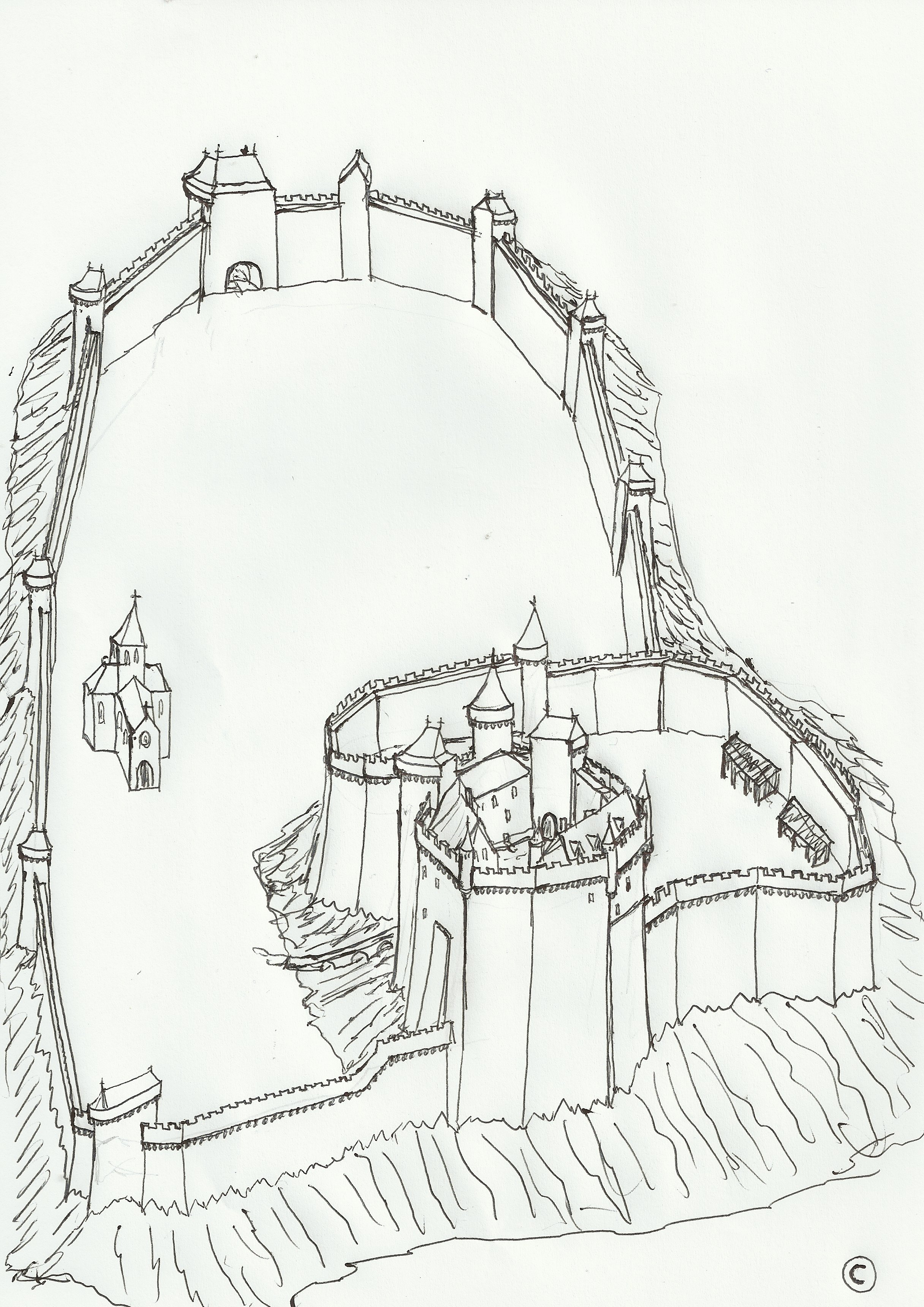 Reconstitution du château médiéval de la Roche sur Yon, sous forme d'un croquis en vue aérienne oblique prise du Sud.